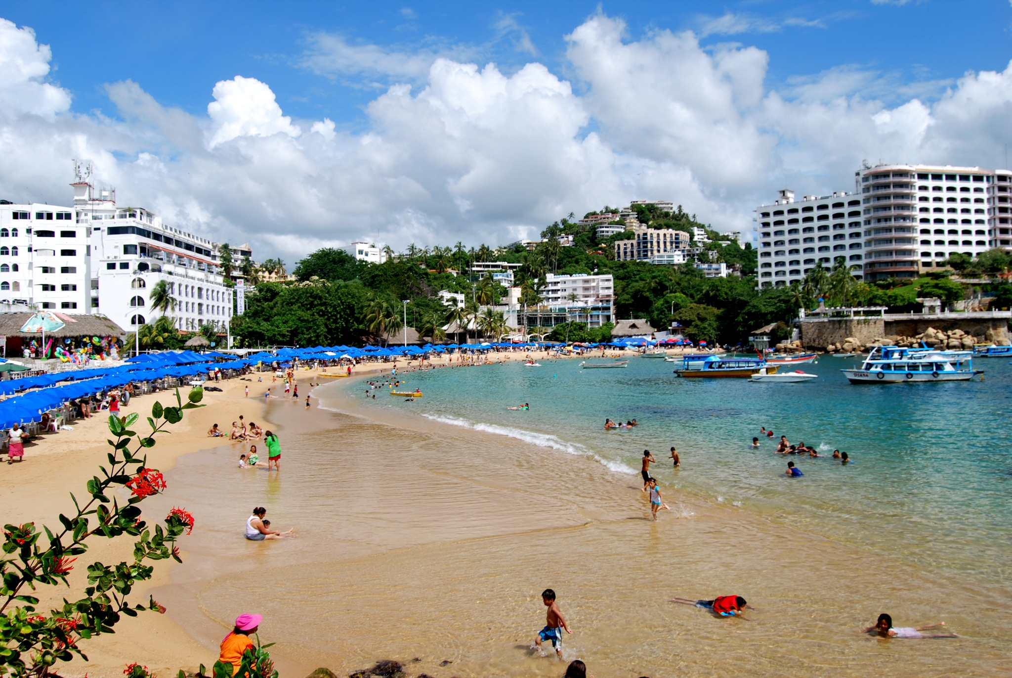 Playa Caleta en Acapulco, Guerrero, México.